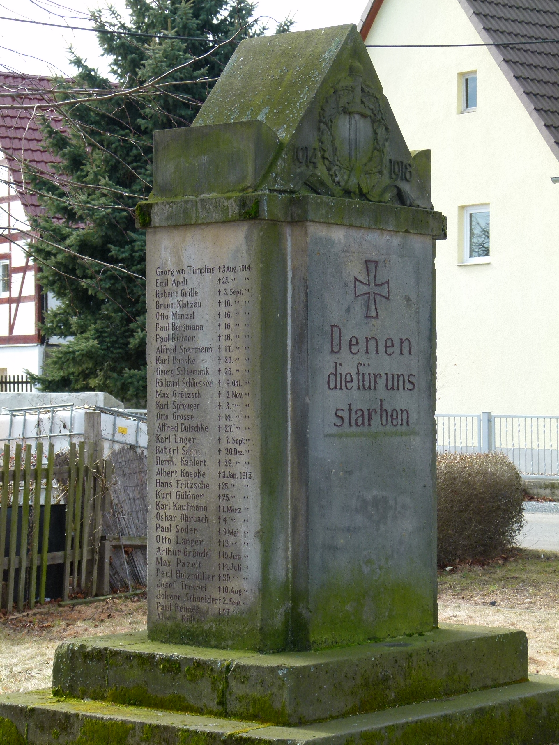 Ehrenmal für Gefallene des 1. Weltkrieges, Altnaundorf, Radebeul